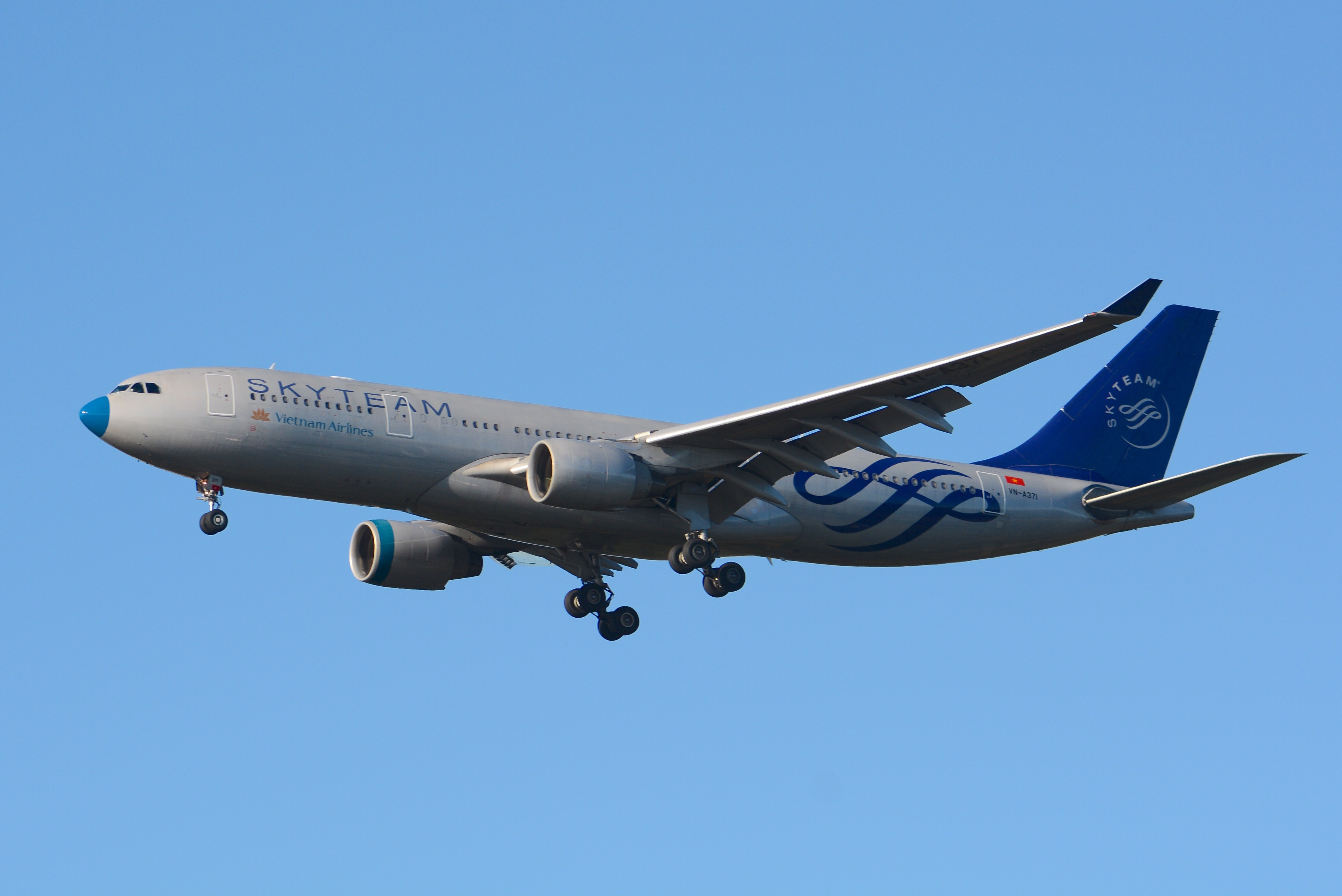 Vietnam Airlines, Airbus A330-200 VN-A371 'Sky Team' NRT